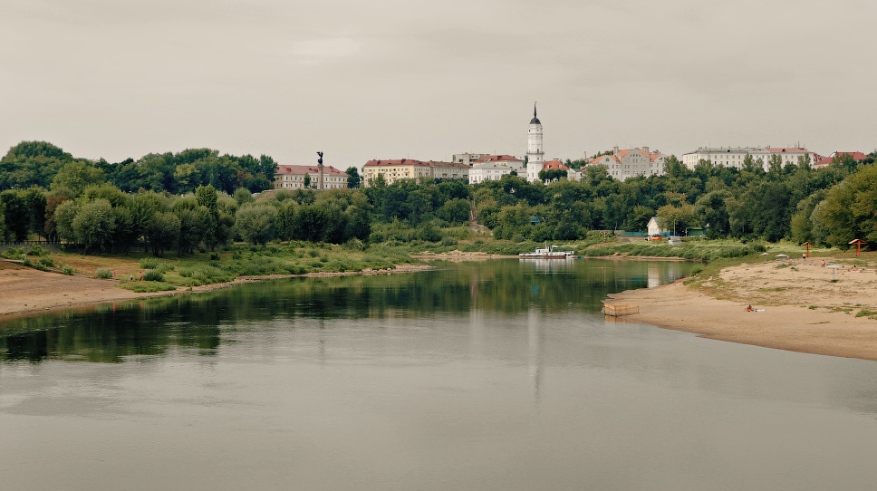 Магілёўскія відарысы